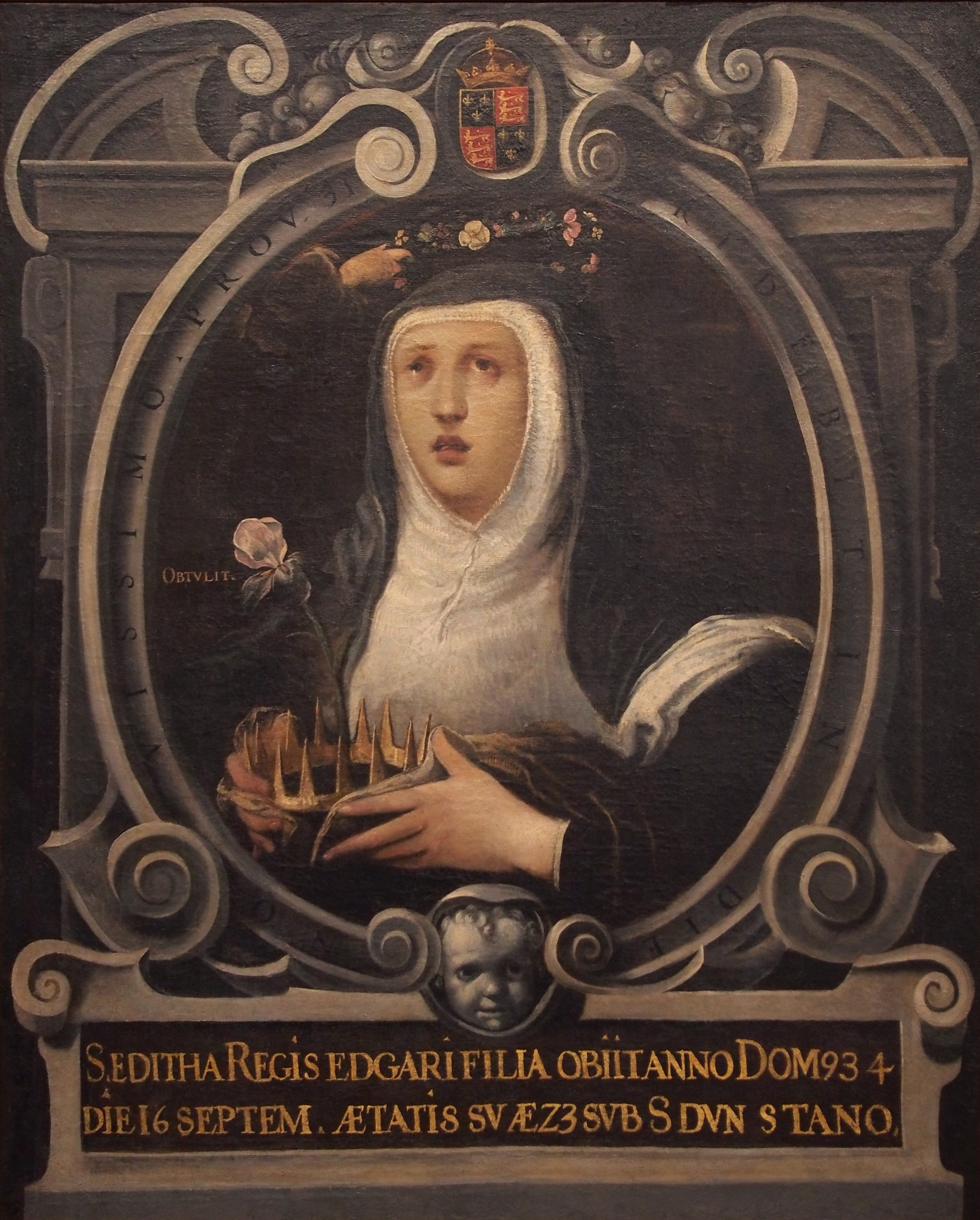 Santa Editha (Edith of Wilton). Obra de Juan de Roelas, c. 1605. Iglesia de San Miguel and San Julián, Valladolid